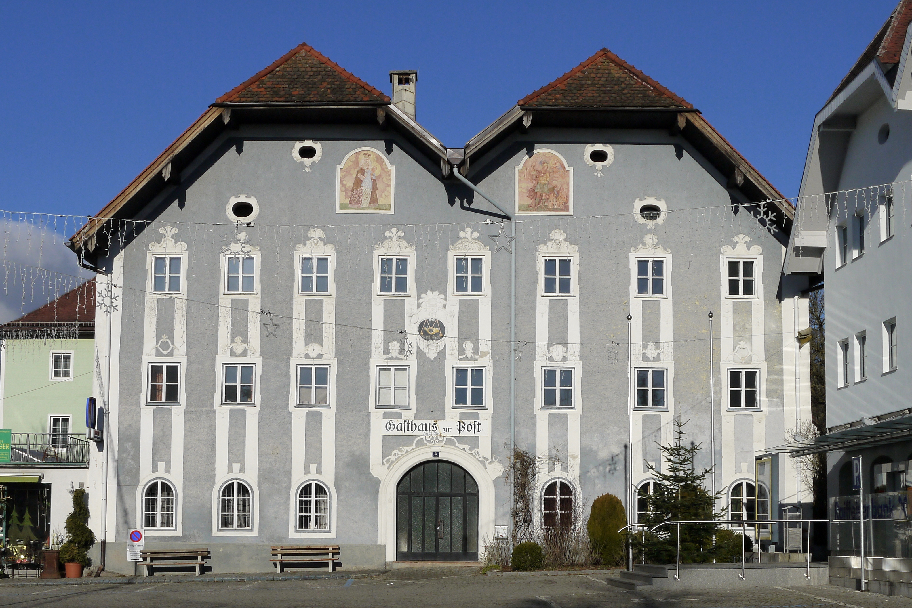 Gasthaus zur Post